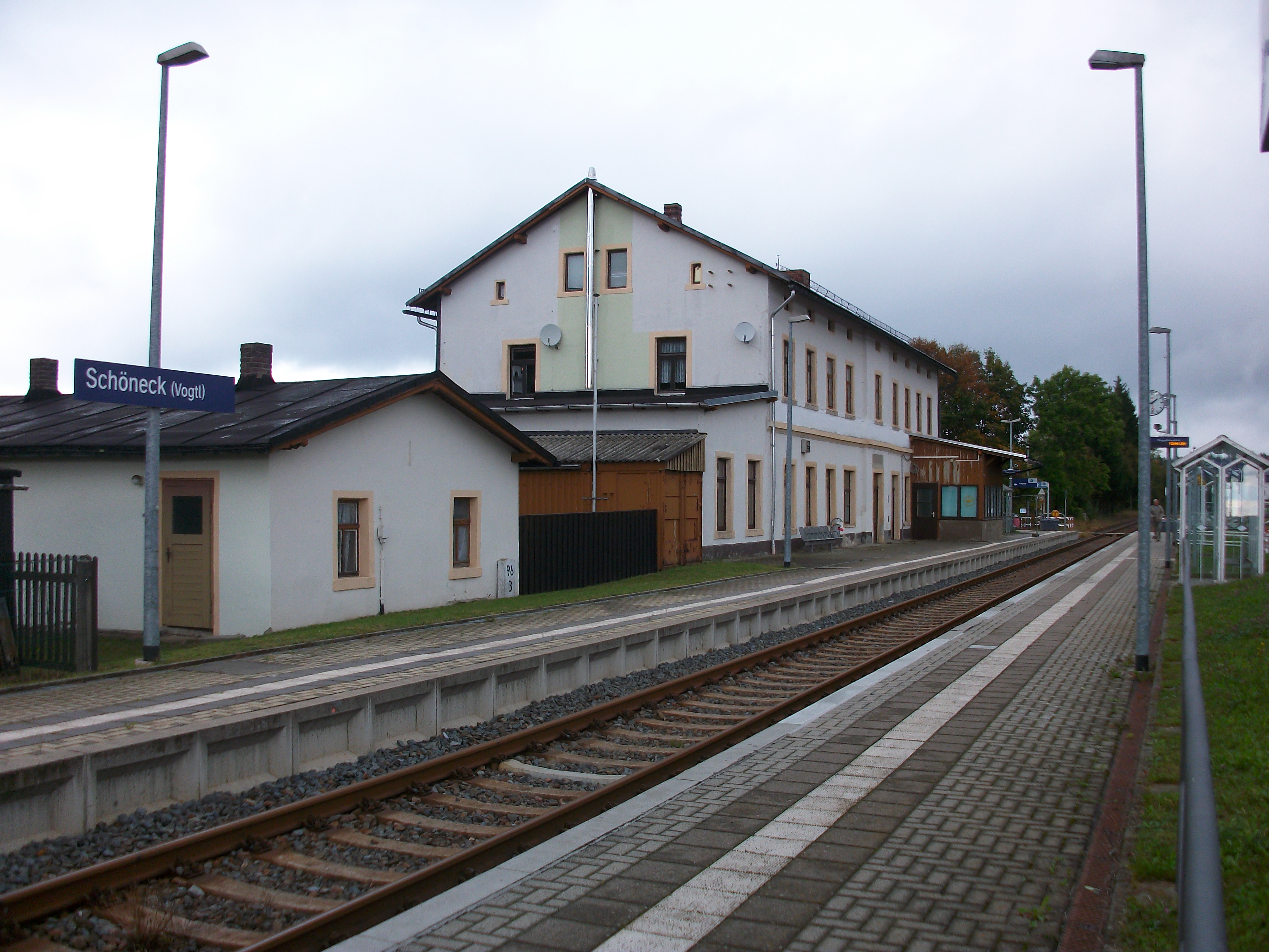 Bahnhof Schöneck (Vogtl), Richtung Falkenstein (2016)